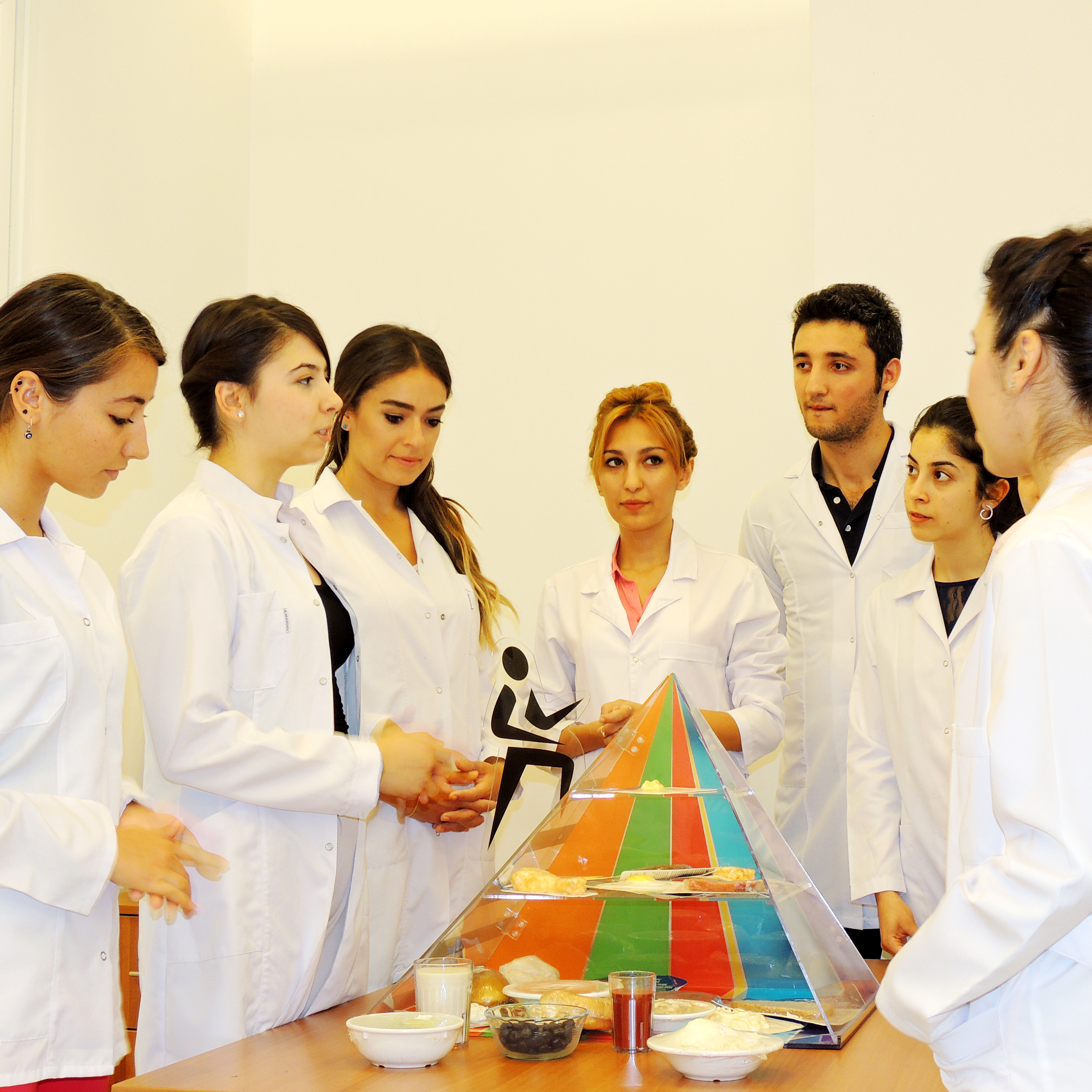 Yakın Doğu Üniversitesi Sağlık Bilimleri Fakültesi Beslenme ve Diyetetik bölümü.